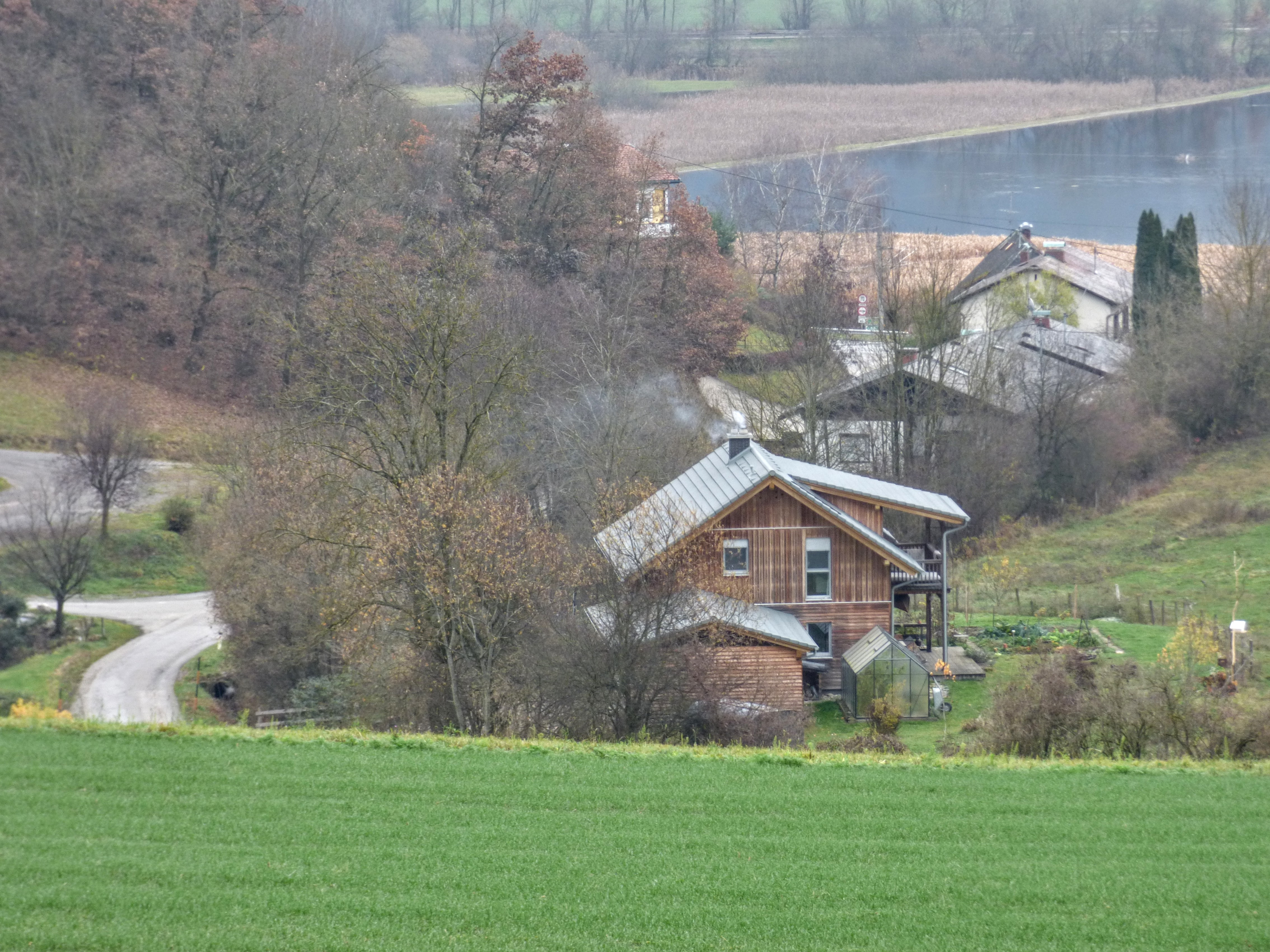 Kraindorf, Mailsberger Weg, Blick nach Südosten. Die Häuser rechts der Straße gehören zur Gemeinde Liebenfels; das Haus im Hintergrund links der Straße zur Gemeinde Frauenstein.